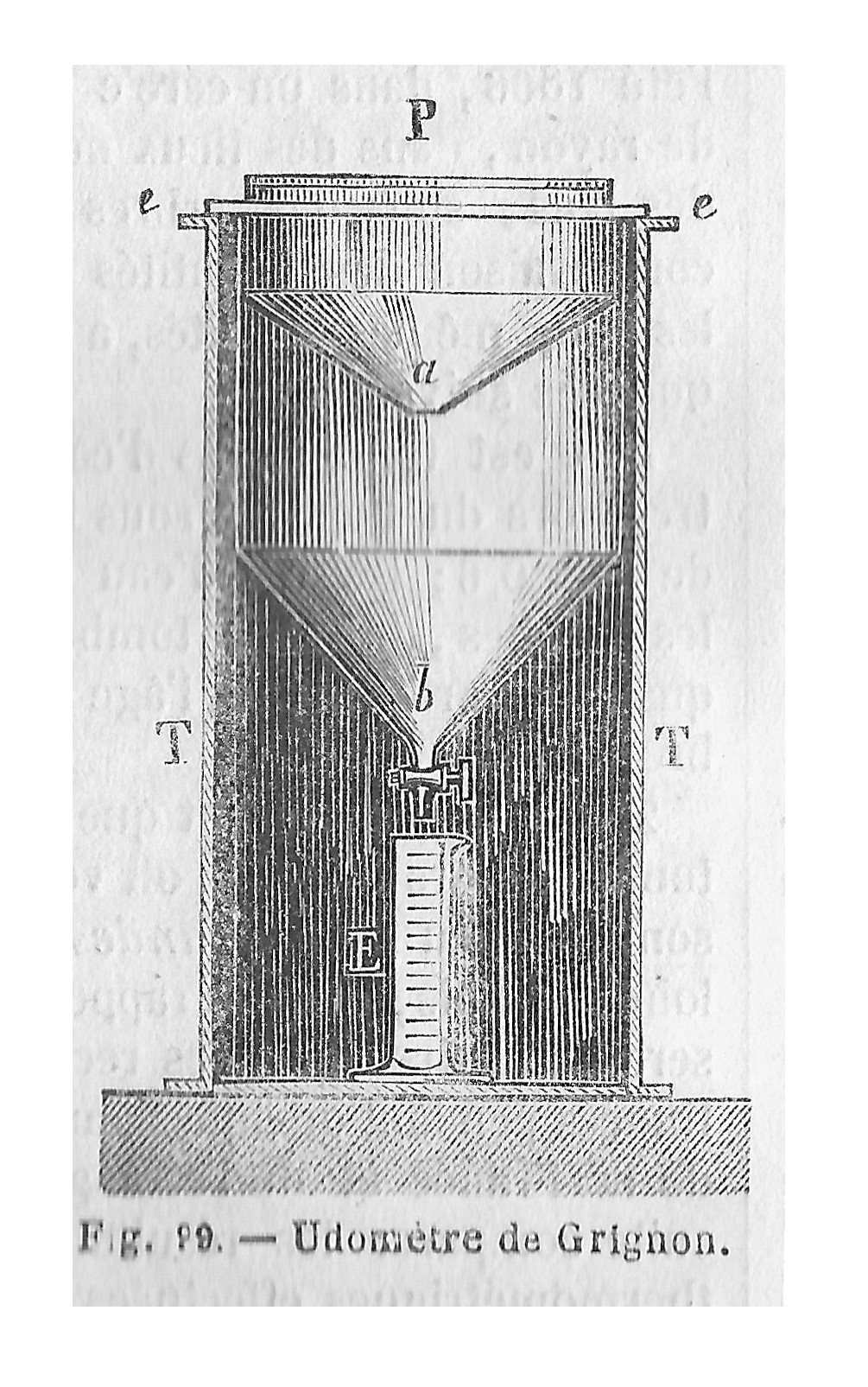 Udomètre (pluviomètre) de l’École d'agriculture de Grignon (France) vers 1875